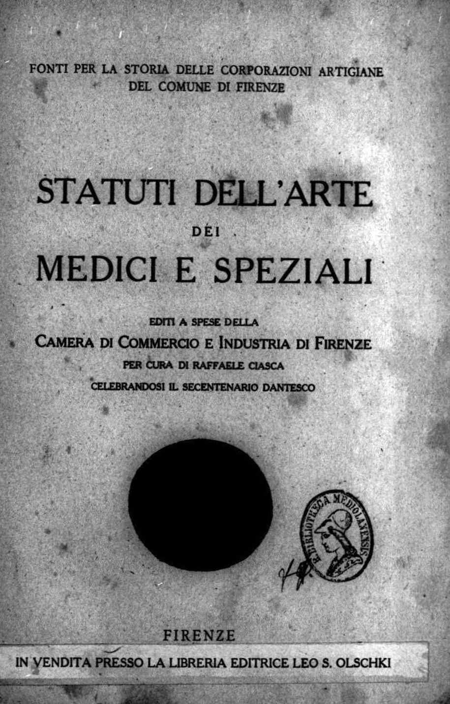 Frontespizio